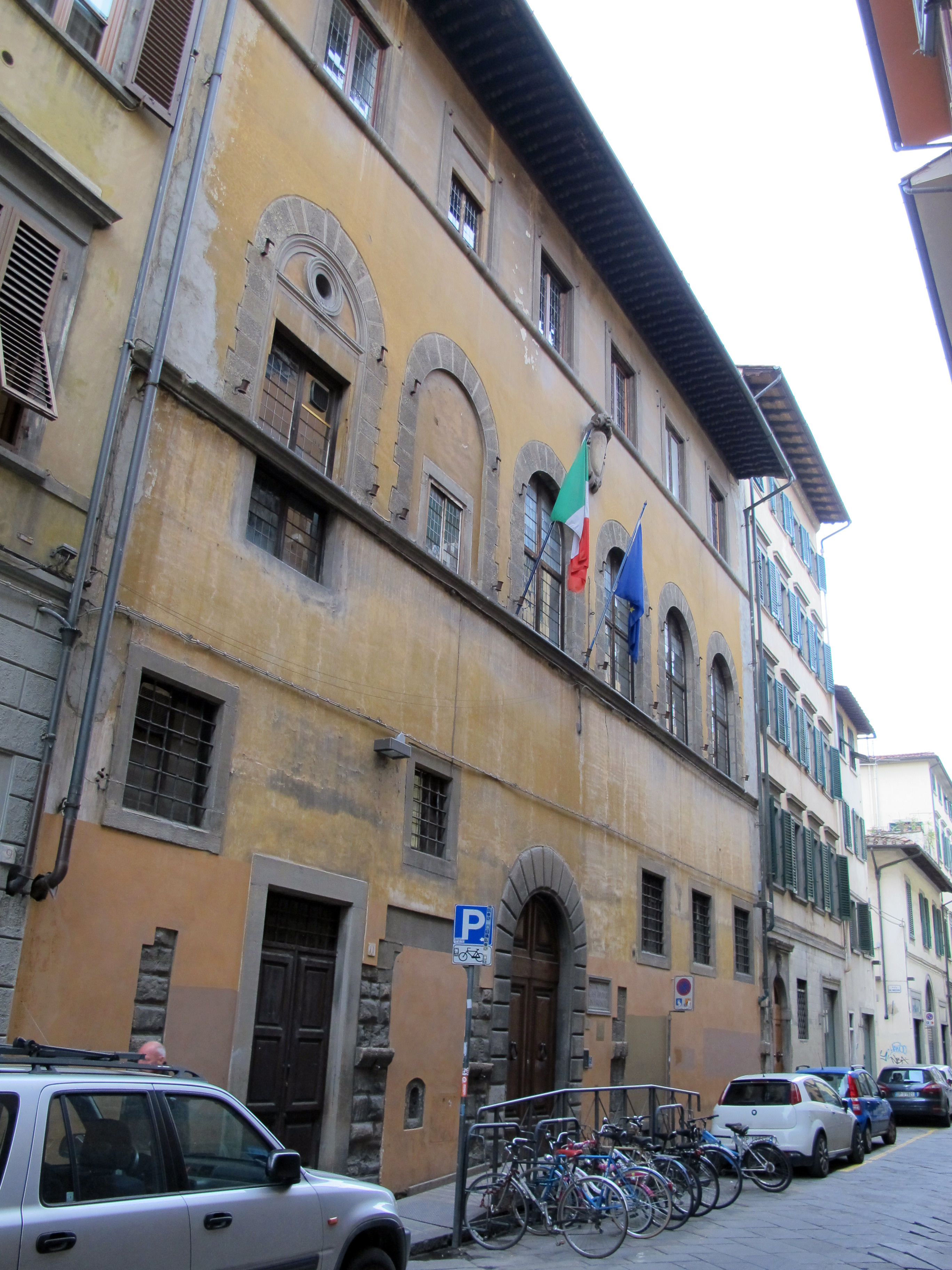 Via fiesolana 5, palazzo dell'icp